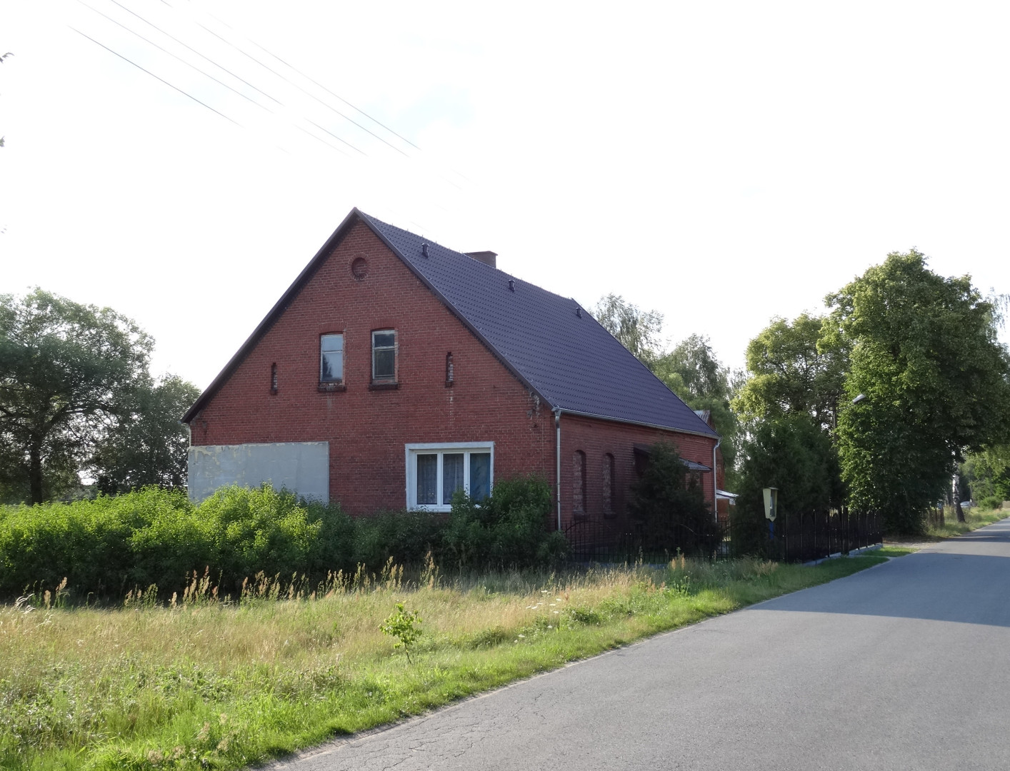 Dobromierz - świetlica wiejska, gmina Nowa Wieś Wielka, powiat bydgoski